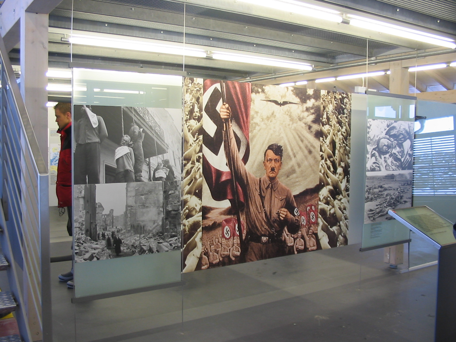 Der Eingangsbereich des Dokumentationszentrums Obersalzberg zeigt ein bekanntes Propagandagemälde des Führers, eingerahmt von Fotos der Auswirkungen seines Dritten Reiches.